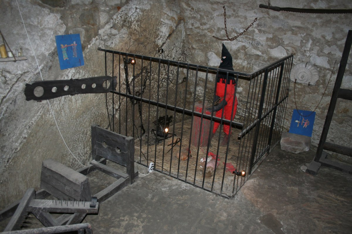 Zamek dobczycki